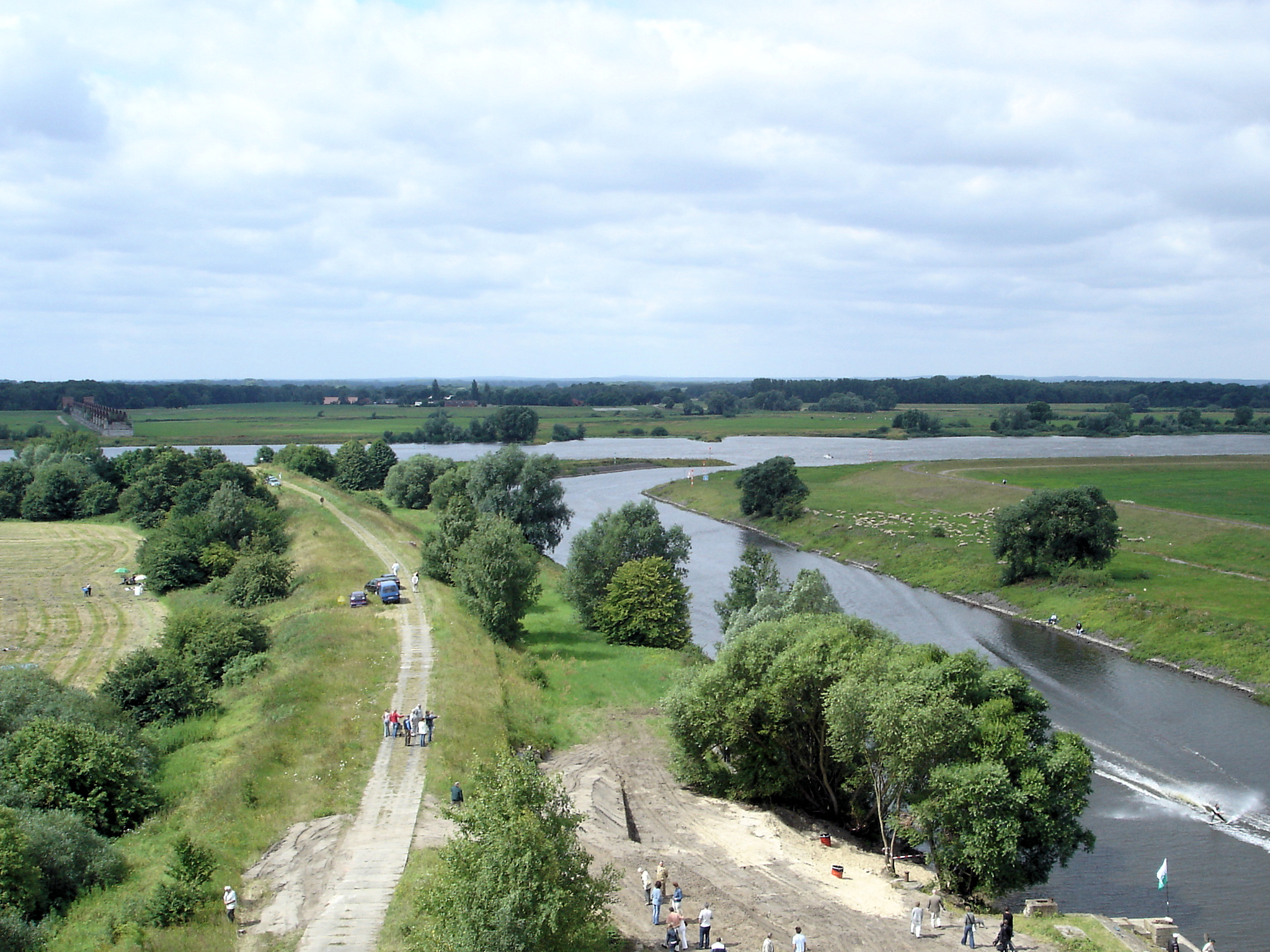 Mündung der Müritz-Elde-Wasserstraße in die Elbe in Dömitz, Mecklenburg-Vorpommern